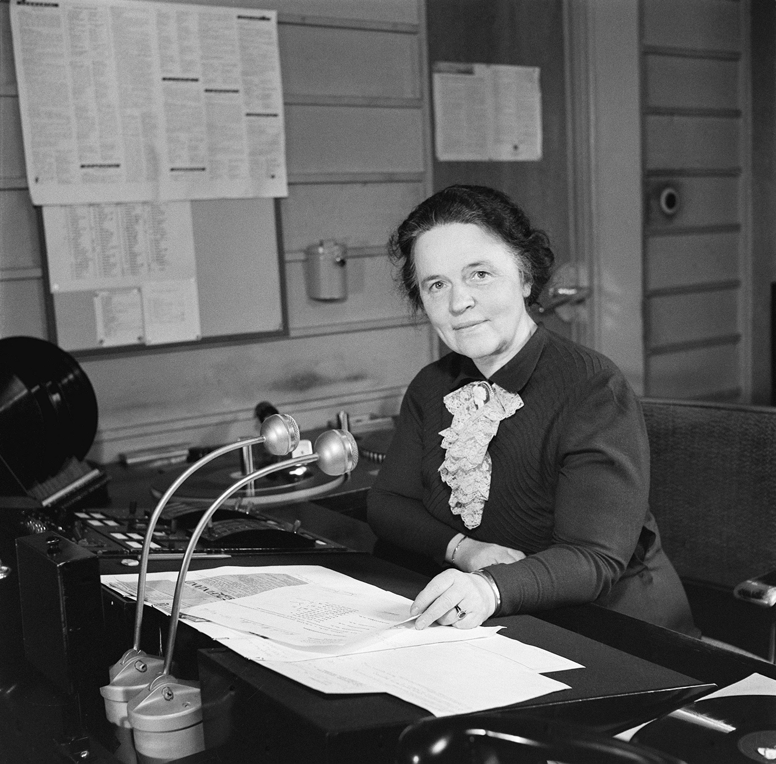 Radiokuuluttaja Ebba Jakobson-Lilius kuuluttamon pöydän ääressä (kuuluttajana 1.2.1929-31.8.1946). Kuvausaika arvioitu vuosikymmenen tarkkuudella. Tiedätkö jotain tästä kuvasta? Jätä kommentti tai ota yhteyttä sähköpostitse: Tutustu Ylen arkistosisältöihin: Fler skatter från Yles arkiv: More about Yle, the Finnish Broadcasting Company